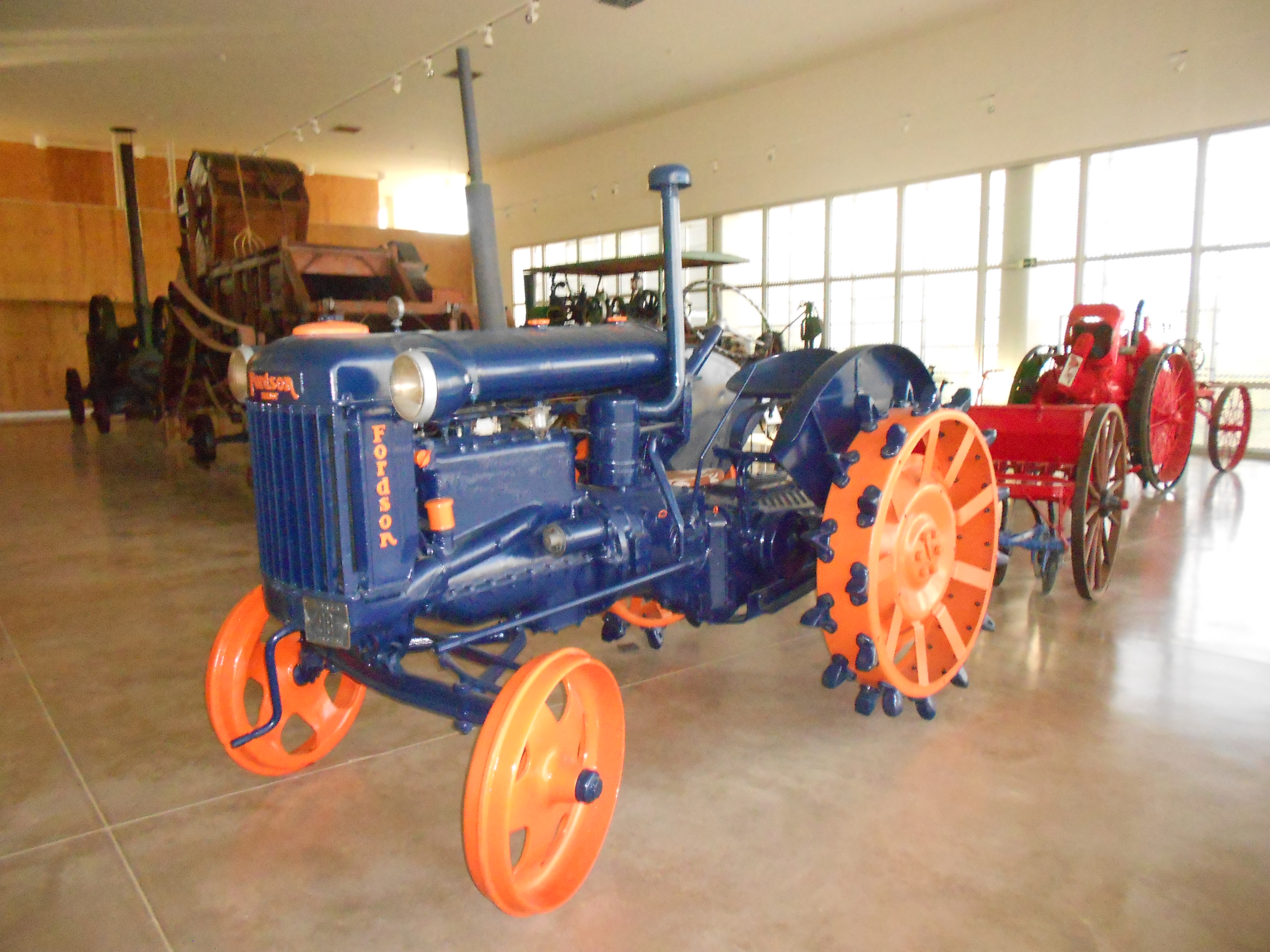 Antiguo tractor. Museo Aquagraria (Ejea de los Caballeros)